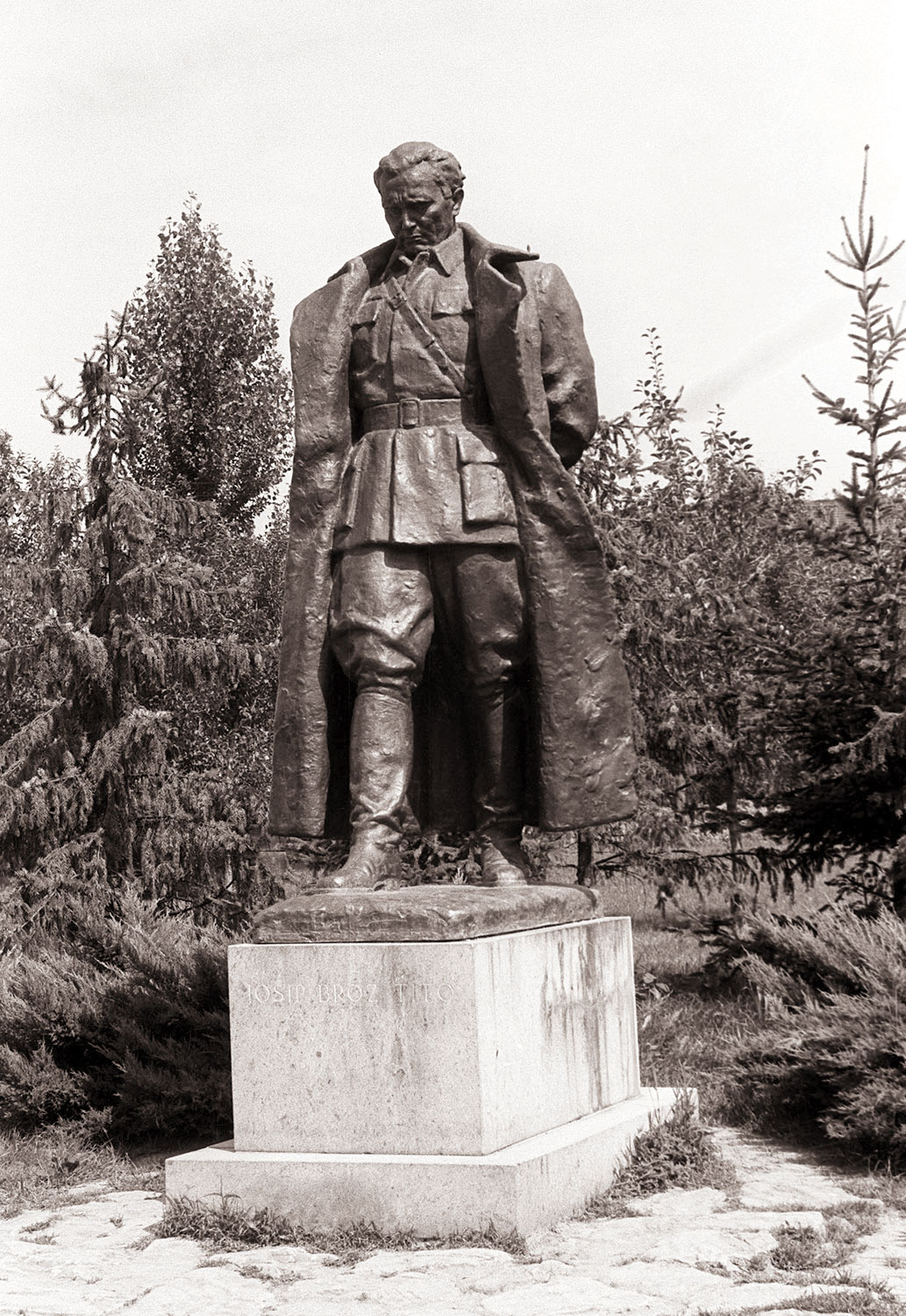 Kip Josipa Broza Tita v Kumrovcu.